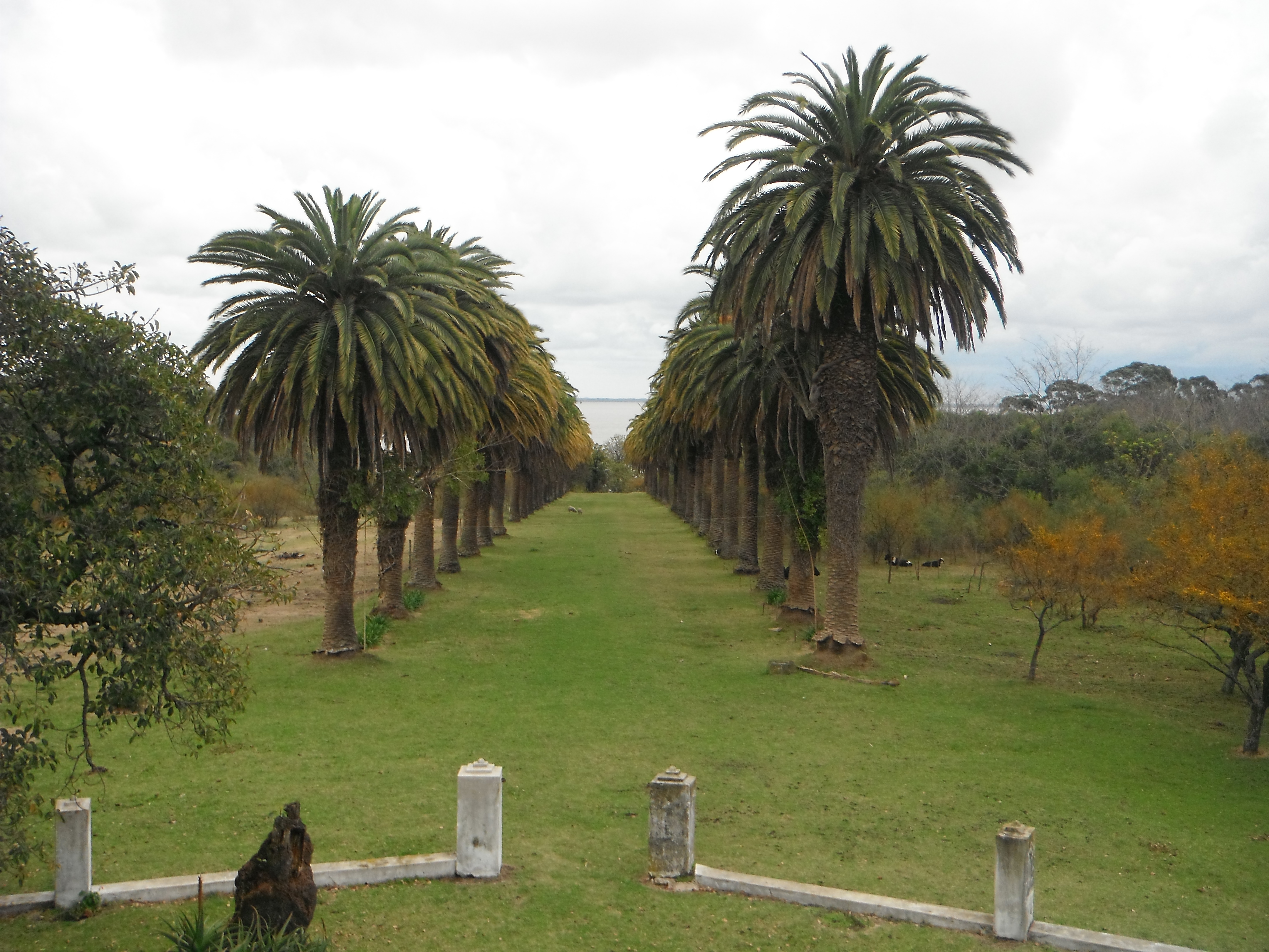 Edificios del casco de Estancia de Domingo Ordoñana - Estancia Buena Vista. Ubicada en el departamento de Soriano